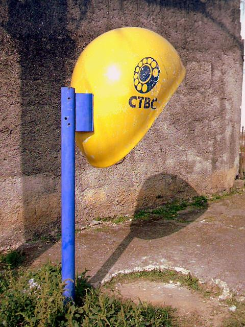 Orelhão da antiga CTBC